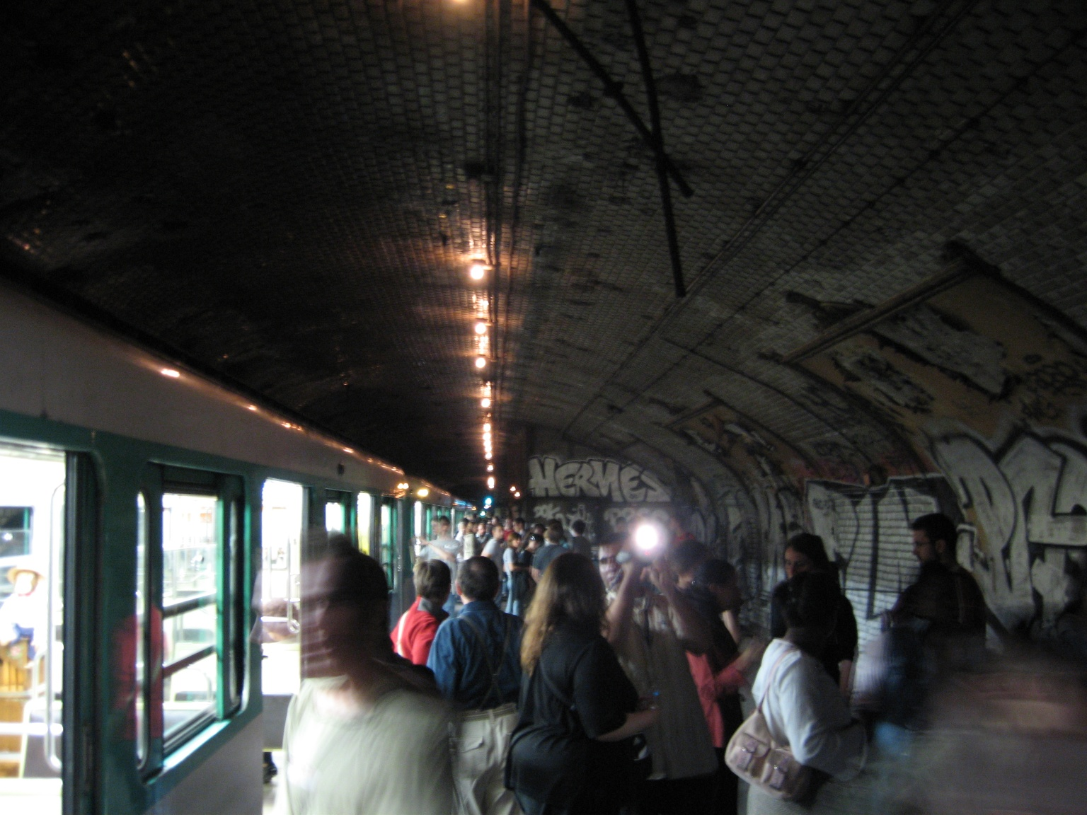 Journées du patrimoine RATP 16-17/09/2006. Station fantôme de Saint-Martin.